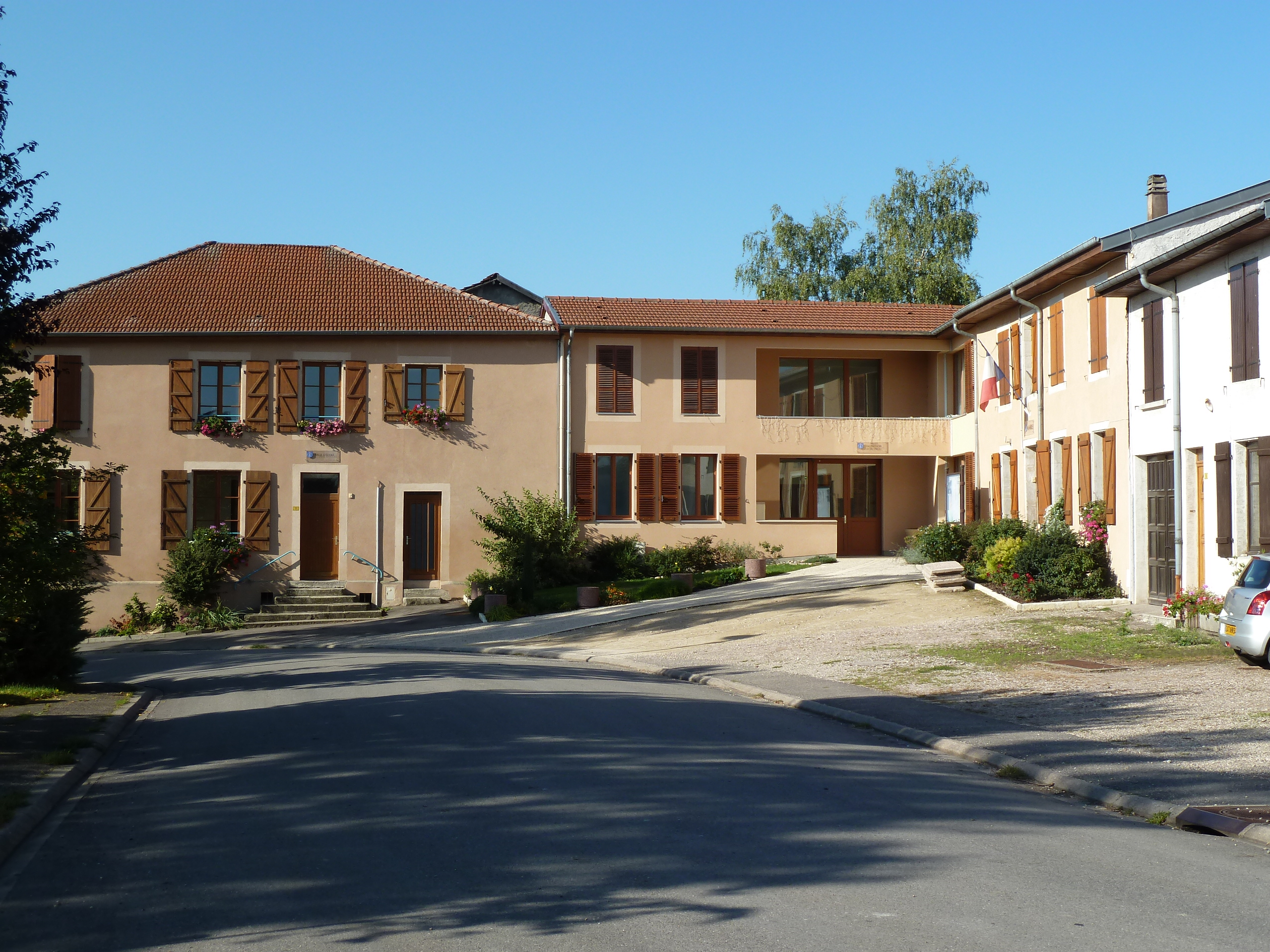 vue de la mairie